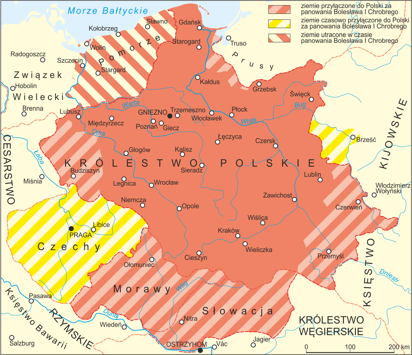 Polska za czasów króla Bolesława I Chrobrego. Autor: Aotearoa